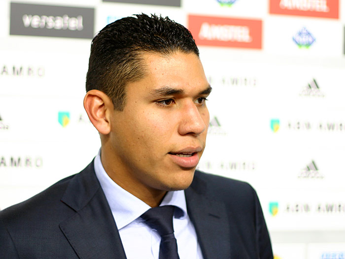 Hedwiges Maduro side.jpg